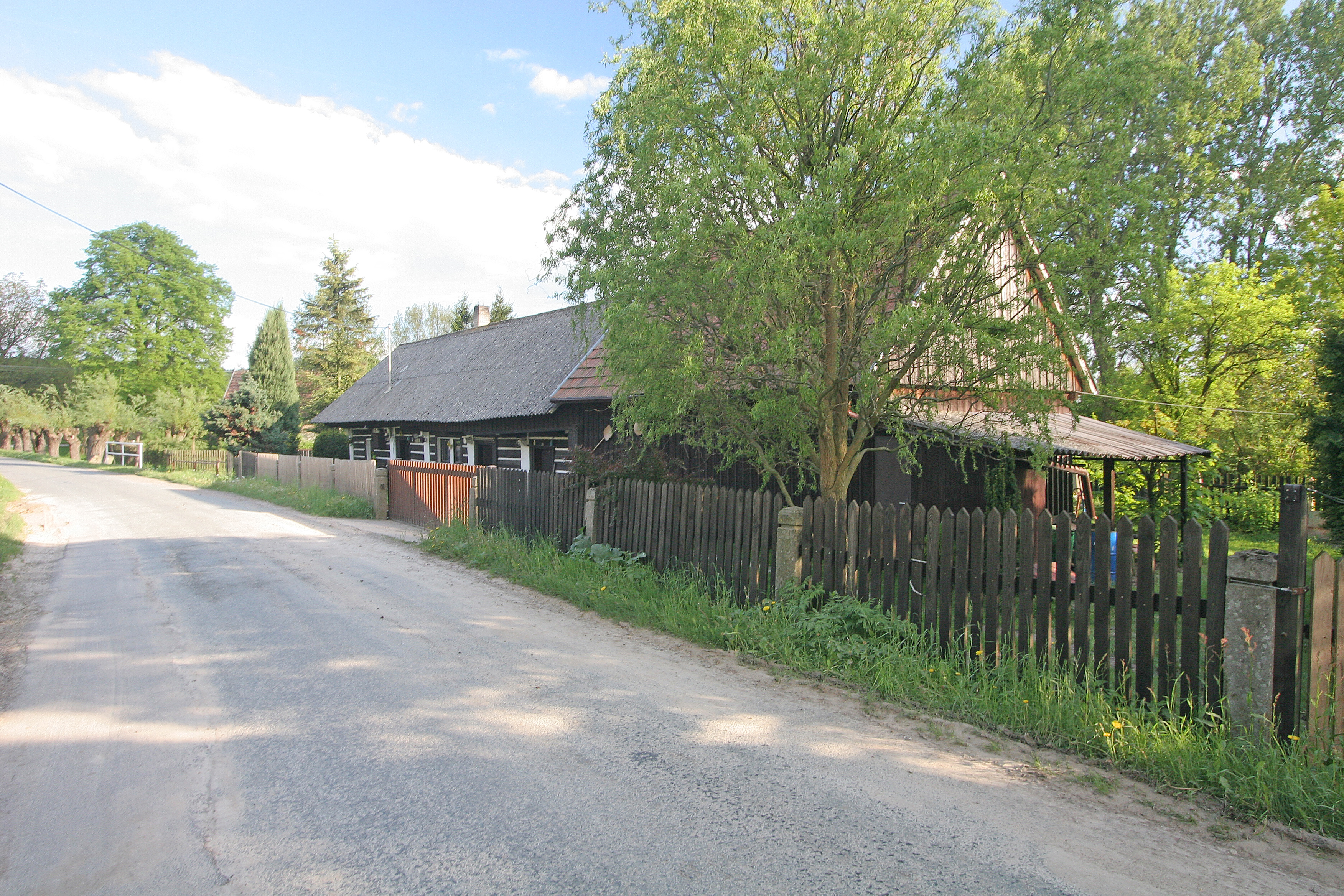 Libeň čp. 3